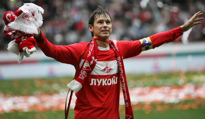 Егор Титов